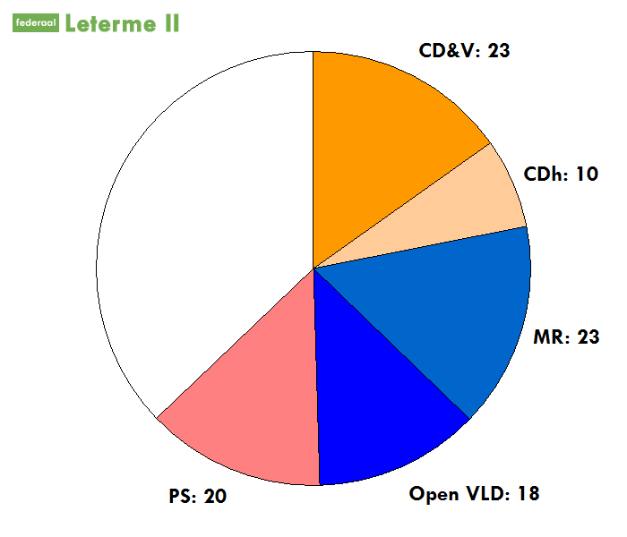 zetelverdeling in de kamer voor de meerderheid van Leterme II